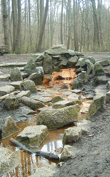 das Königsbrünnchen im Frankfurter Stadtwald, die hellbraune Färbung kommt von Eisenoxydhydrat, dem Wasser wird heilende Wirkung nachgesagt, schmeckt leicht nach Schwefelwasserstoff